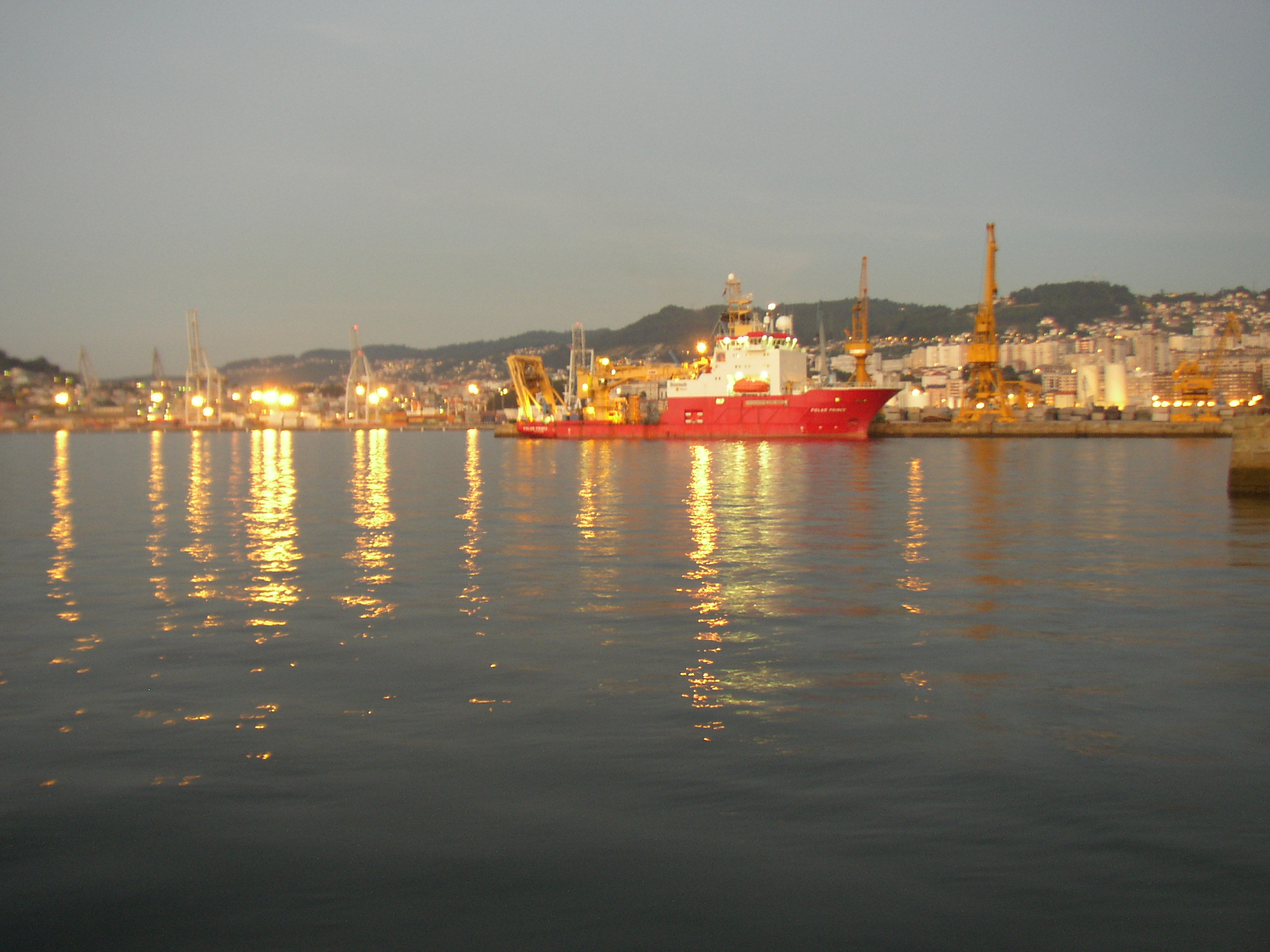 Porto comercial de Vigo El barco que veis en la foto es el Polar Prince. Este buque participó en las labores de extracción del fuel depositado en las bodegas del petrolero Prestige, hundido a 4.000 metros de profundidad y a 130 millas al Oeste de las Islas Cíes.